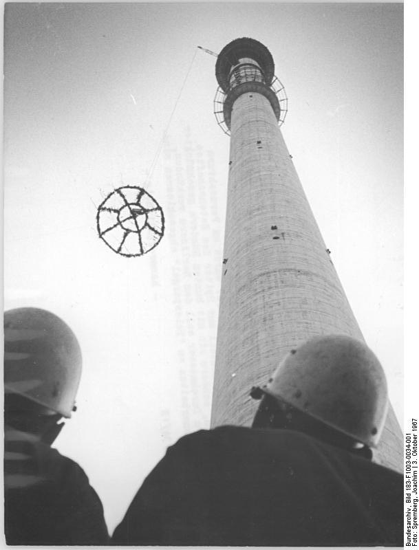 Zentralbild Spremberg 3.10.1967 Berlin: Betonarbeiten am neuen Fernsehturm abgeschlossen. Am Nachmittag des 2. Oktober 1967 wurde am Fernsehturm ausnahmsweise kein Bauteil zur Spitze des Betonschaftes heraufgezogen, sondern ein mit bunten Bändern geschmückter Kranz von 7 m Durchmesser soll den Berlinern verkünden, daß die Betonarbeiten am "Telespargel" abgeschlossen sind.